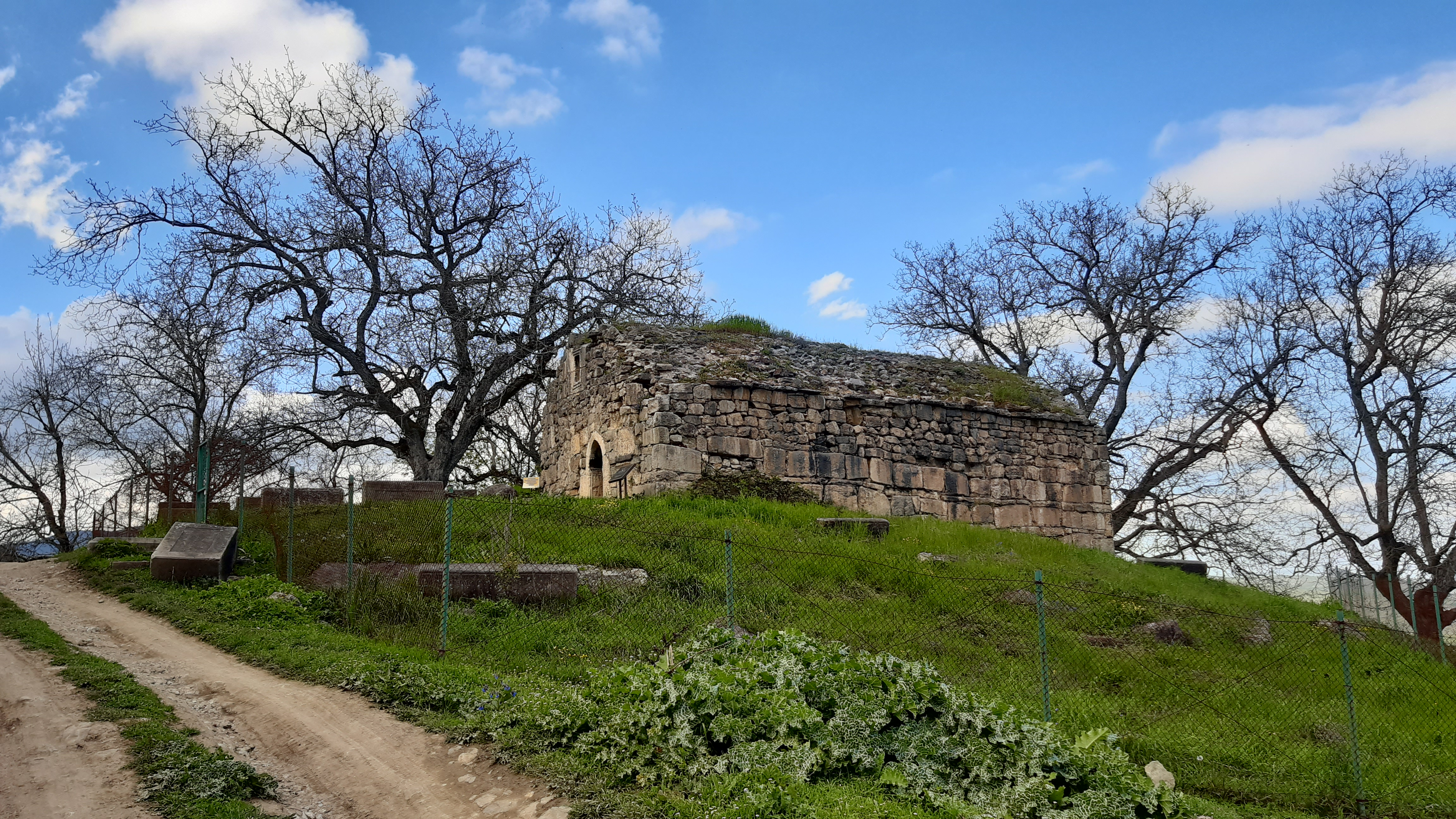 Ս.Ստեփանոս եկեղեցի